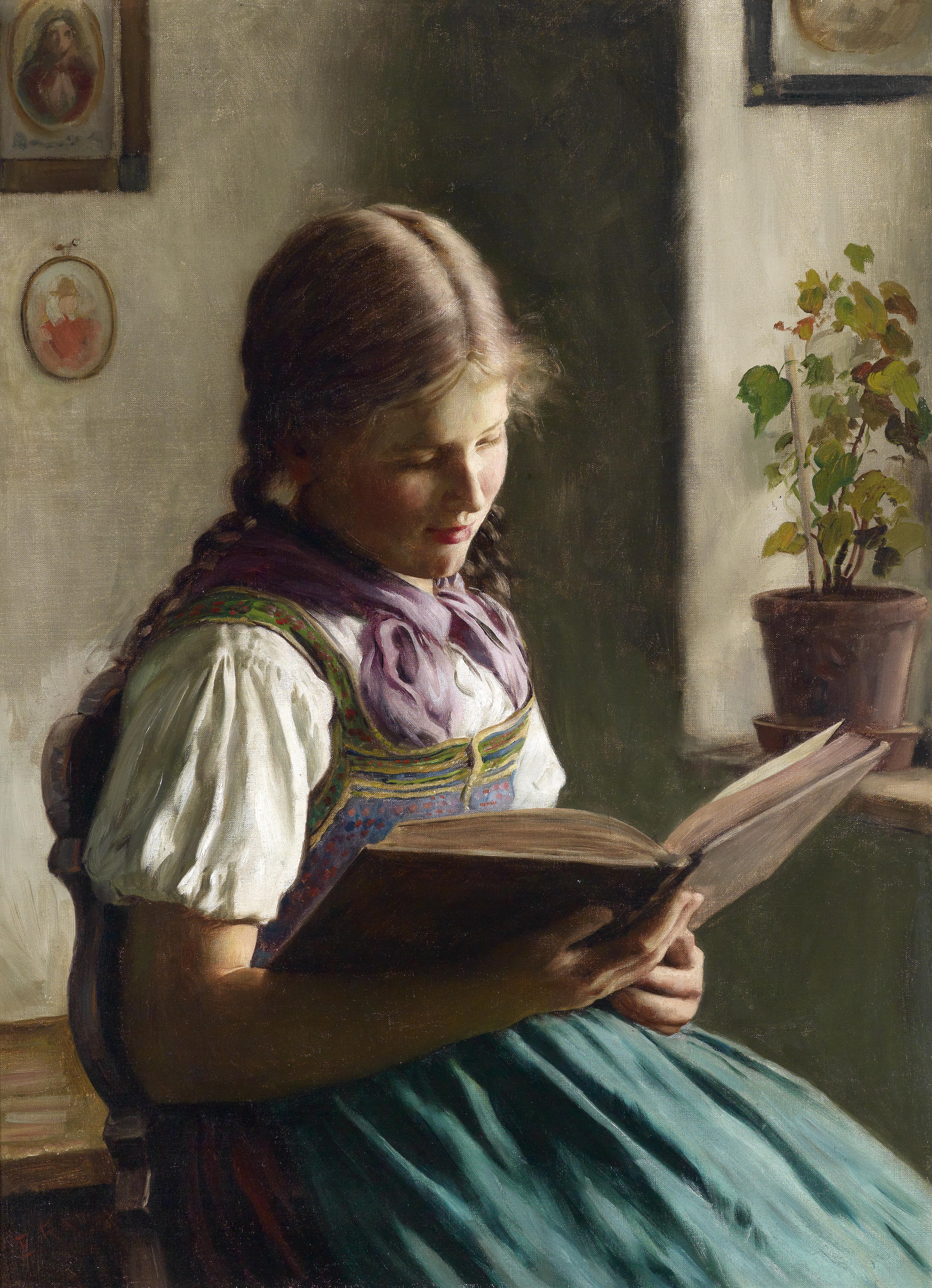 Lesendes Mädchen